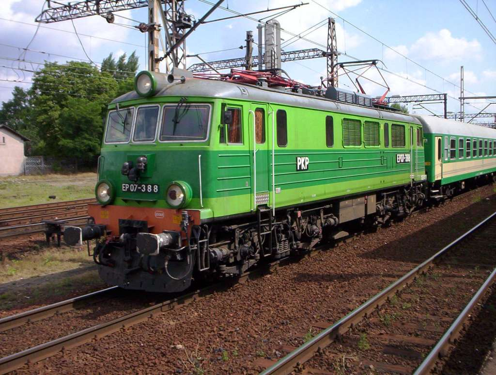 EP07-388 (303E) 20.07.2005 w Skierniewicach